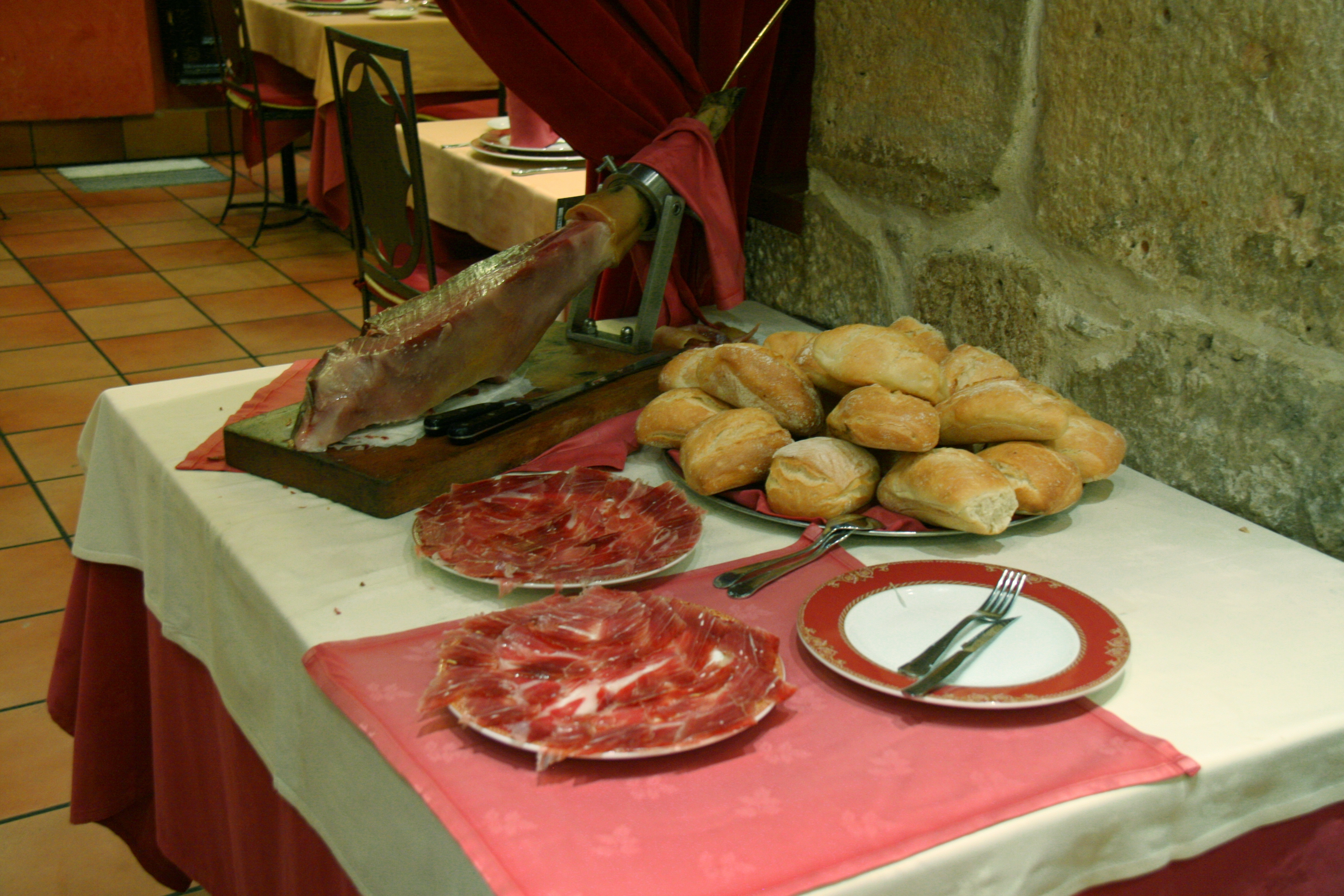 Jamonero y dos platos de jamón recién cortado con pan (San Lorenzo - Valladolid)